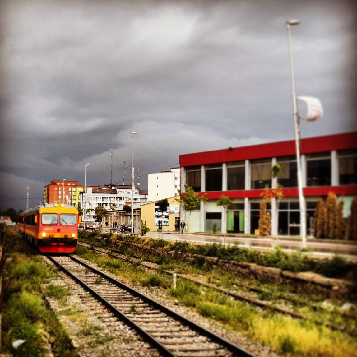 Treni ne qytetin e Ferizaj-t